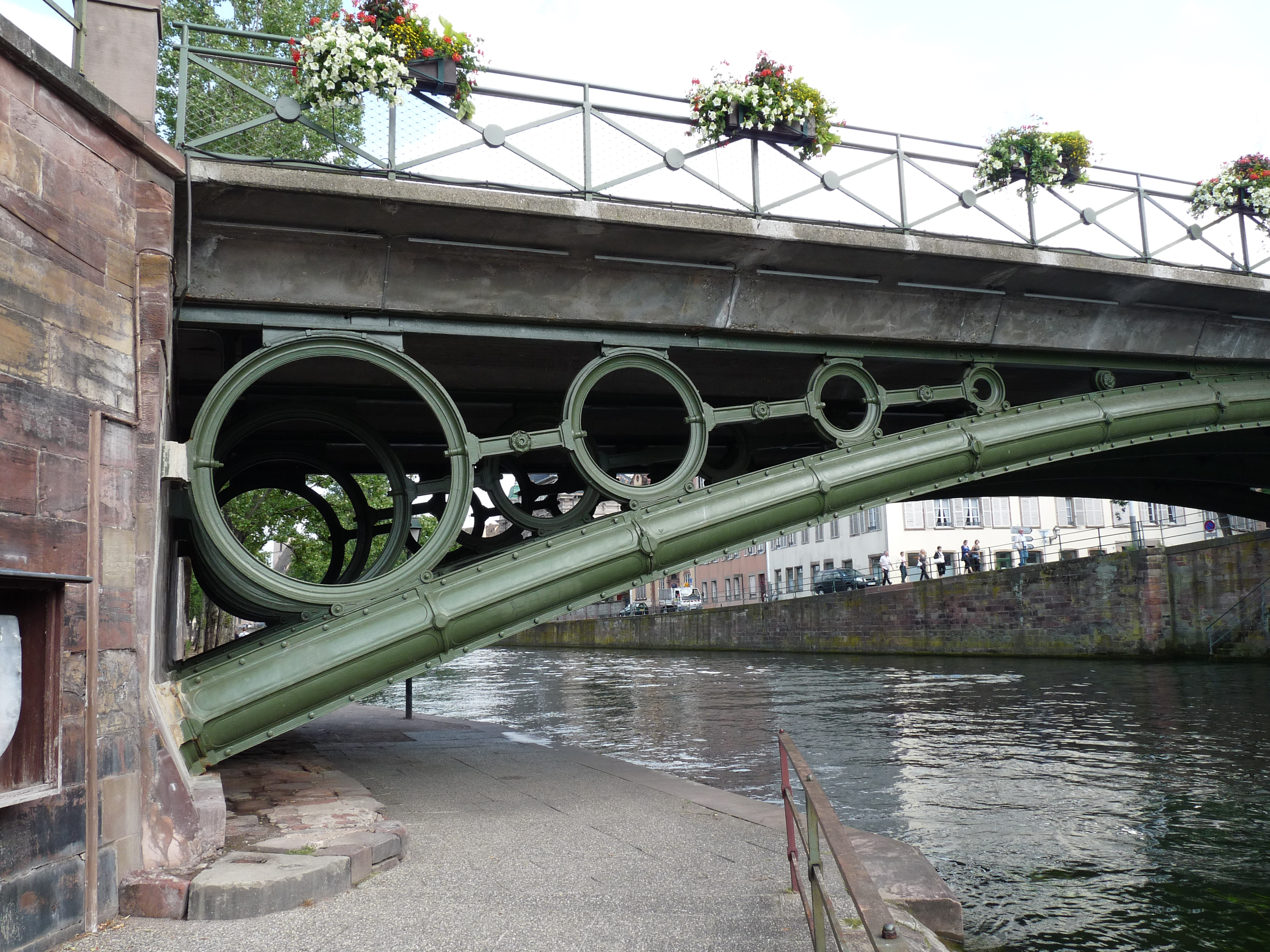 Strasbourg : pont Saint-Thomas dans le quartier Finkwiller. Pont métallique (fonte) construit en 1841 sur les plans de l'ingénieur Antoine-Rémy Polonceau. Classé Monument historique en 1995.